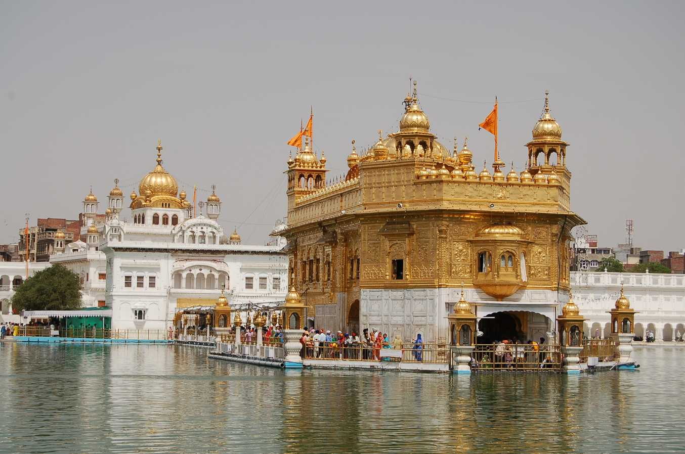 Eigenes Foto